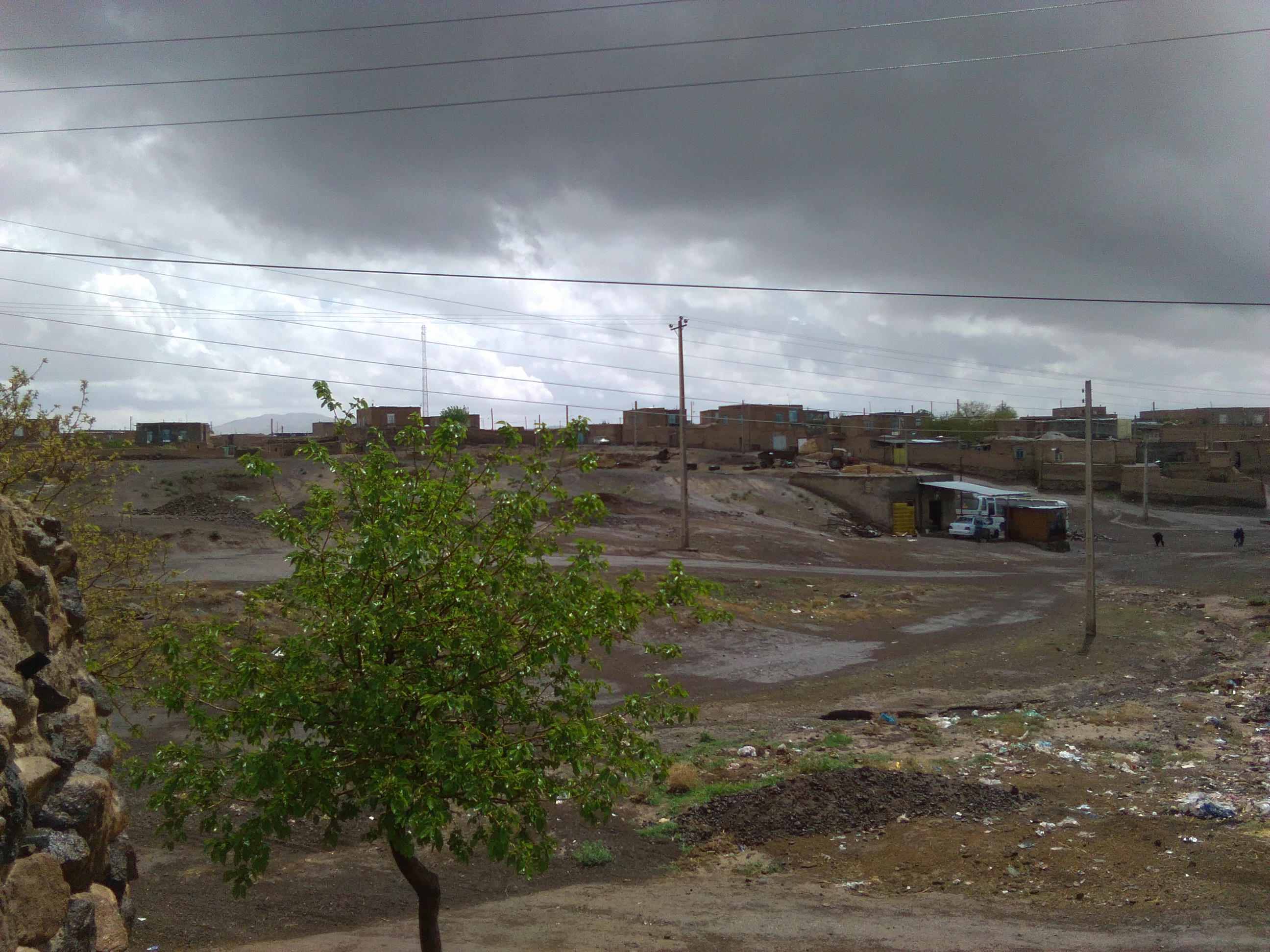 تصویری از روستای فهنه بعد از باران بهاری - این تصویر در تاریخ ۲۶ فروردین ۹۷ توسط جلال رجبی به ثبت رسیده است.